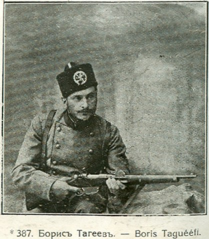 Борис Тагеев.